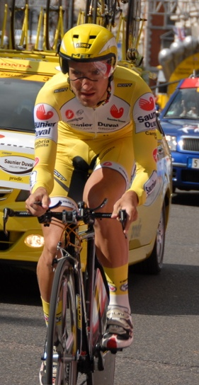 Cobo Acebo (team Saunier Duval). Tour de France 2007 - prologue at London